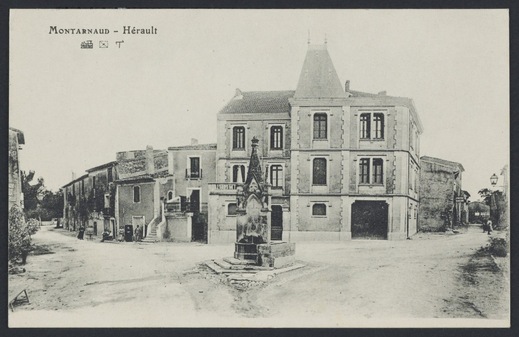 Montarnaud. - Place : carte postale (1ère moitié du XXe siècle)